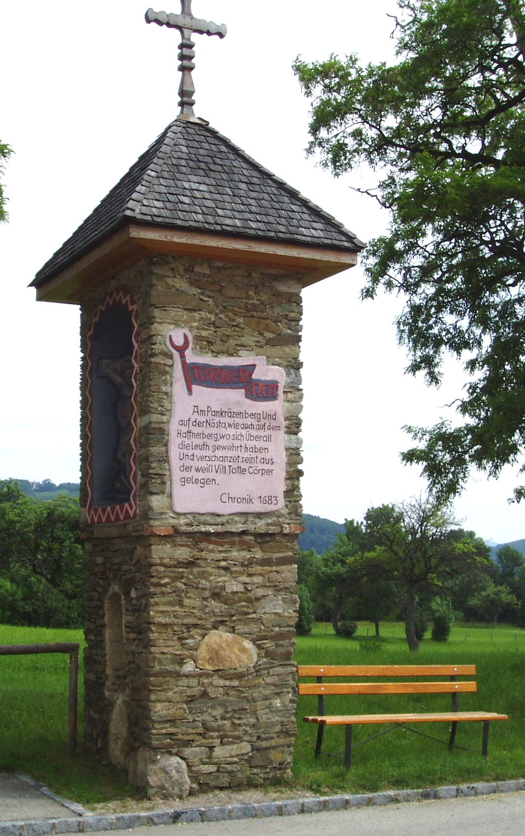 Mahnmal am Pankraziberg bei Alland.